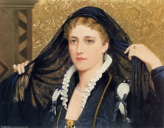 Olivia